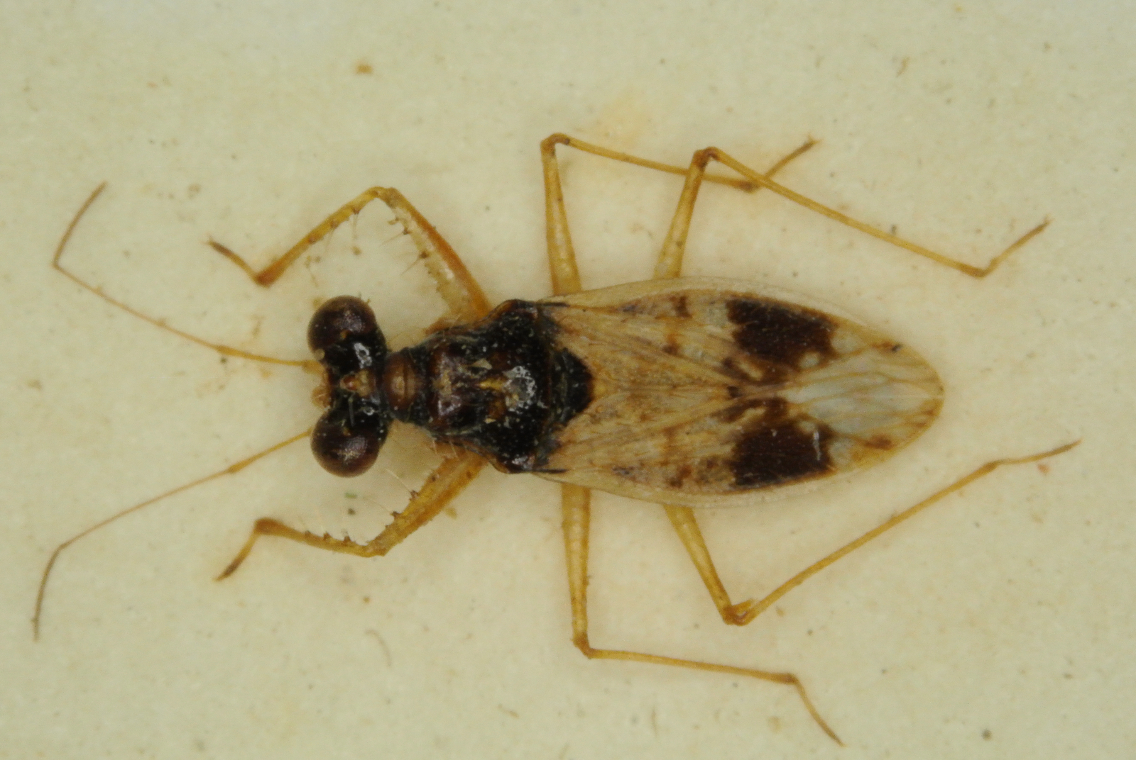 Leptopus hispanus Rambour, 1840 aus Griechenland, Insel Tassos, 27.10.1942; Sammlungspräparat der Zoologischen Staatssammlung München